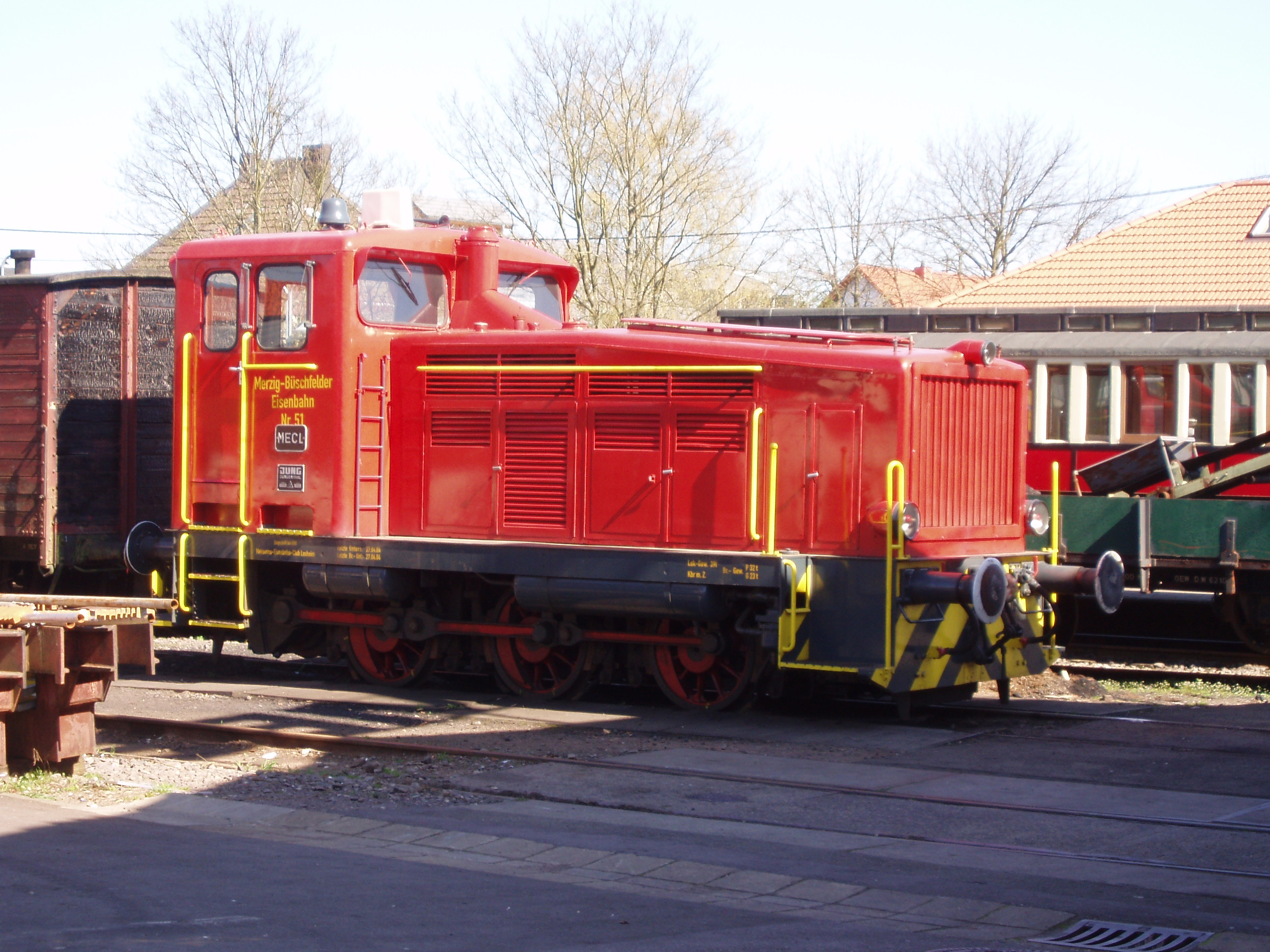 Eisenbahnmuseum Losheim